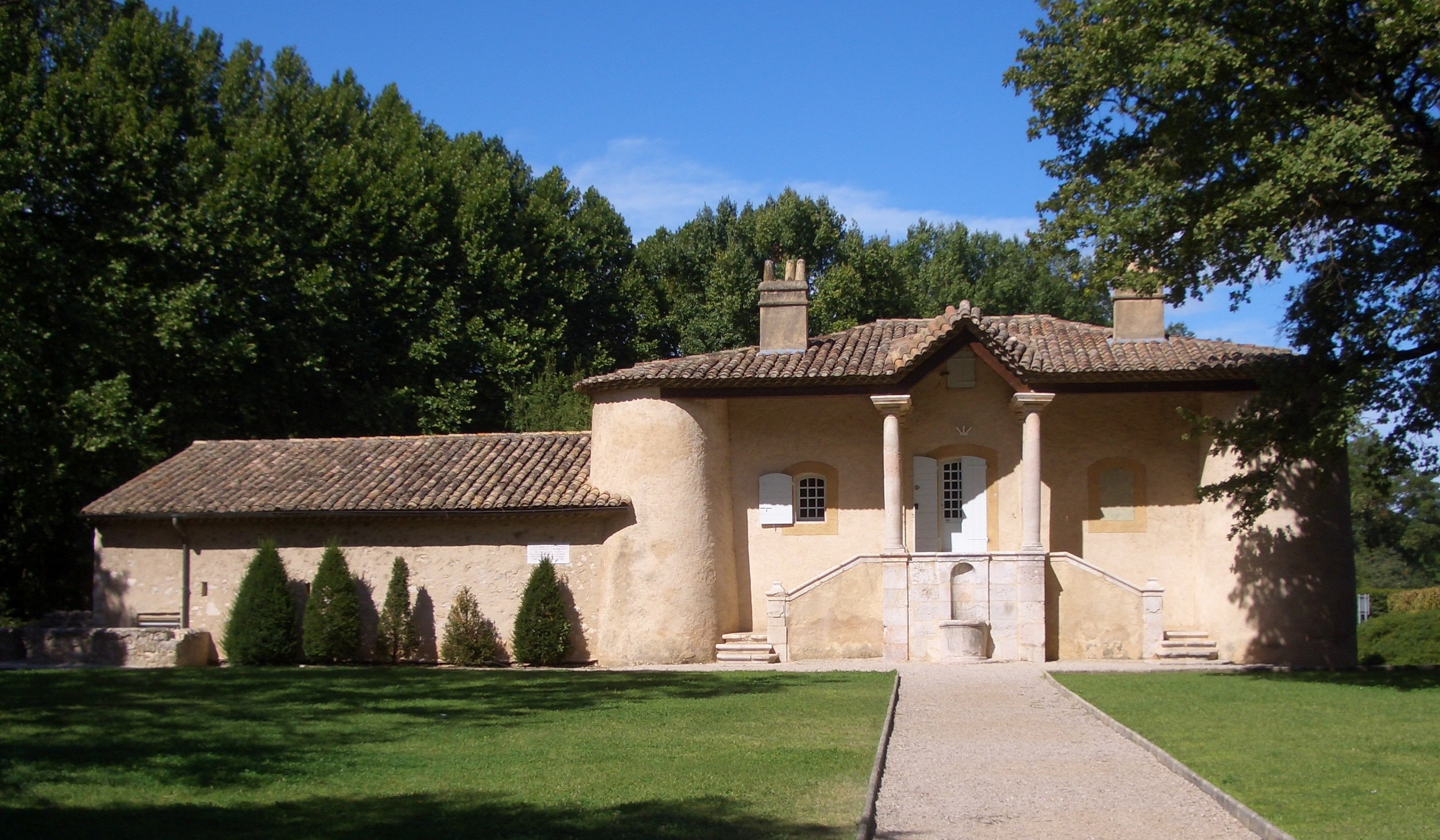 Il Padiglione di caccia di Renato d'Angiò sito presso il castello di Valabre (Aix en Provence).